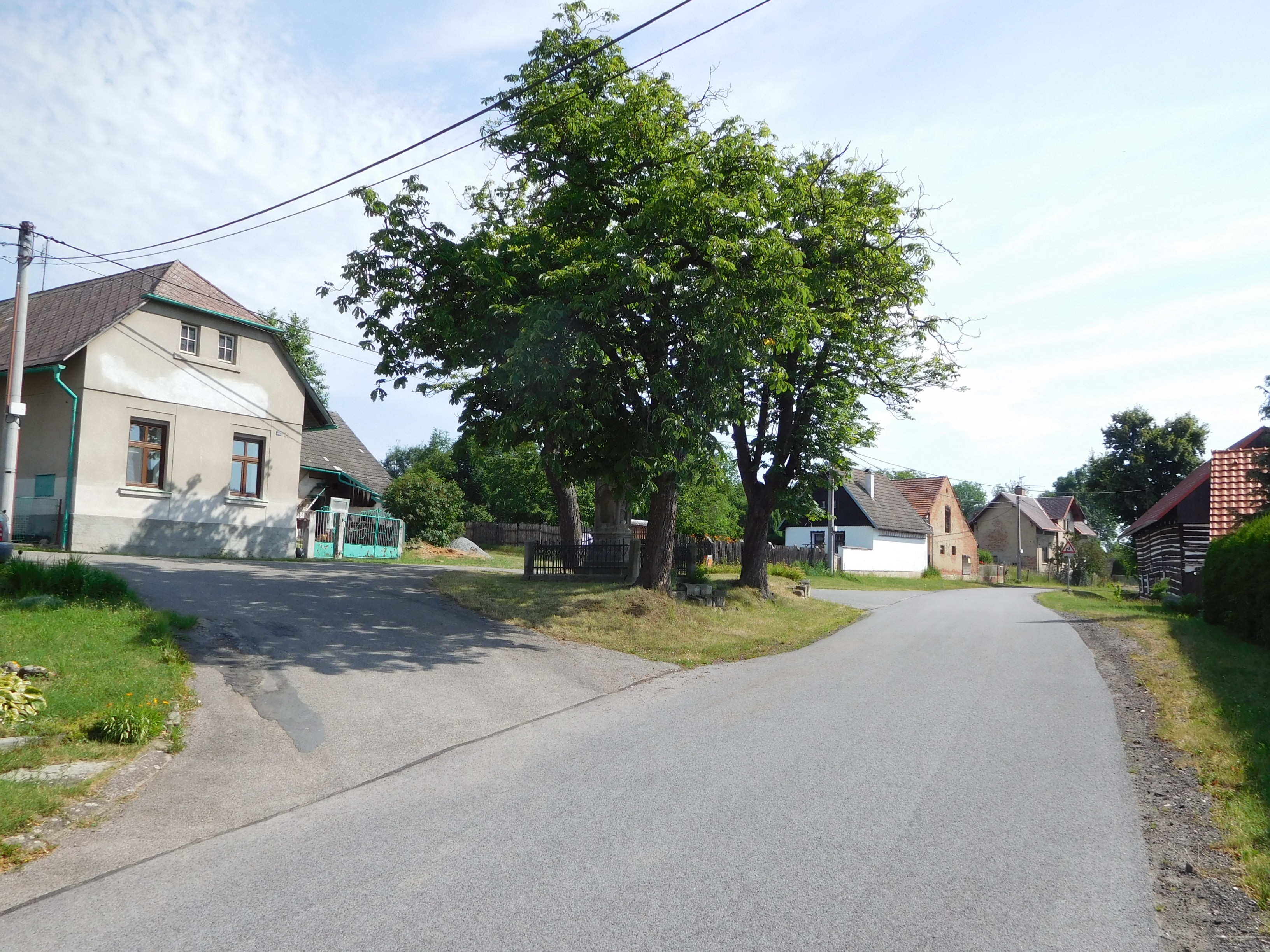 Lično - náves